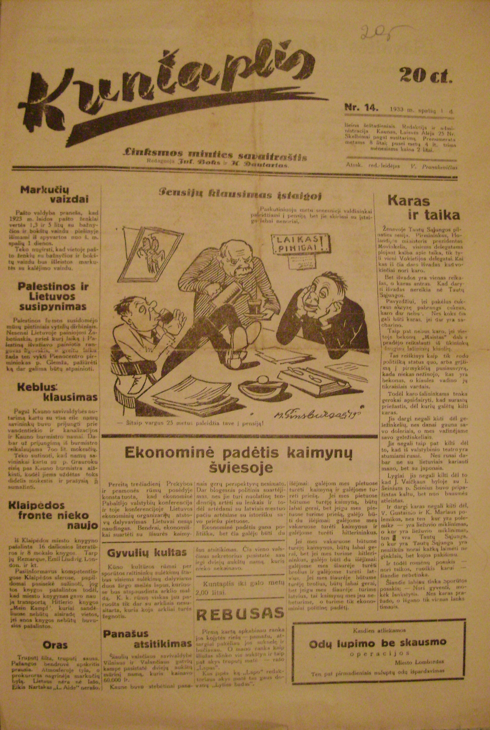 Satyrinis laikraštis "Kuntaplis"